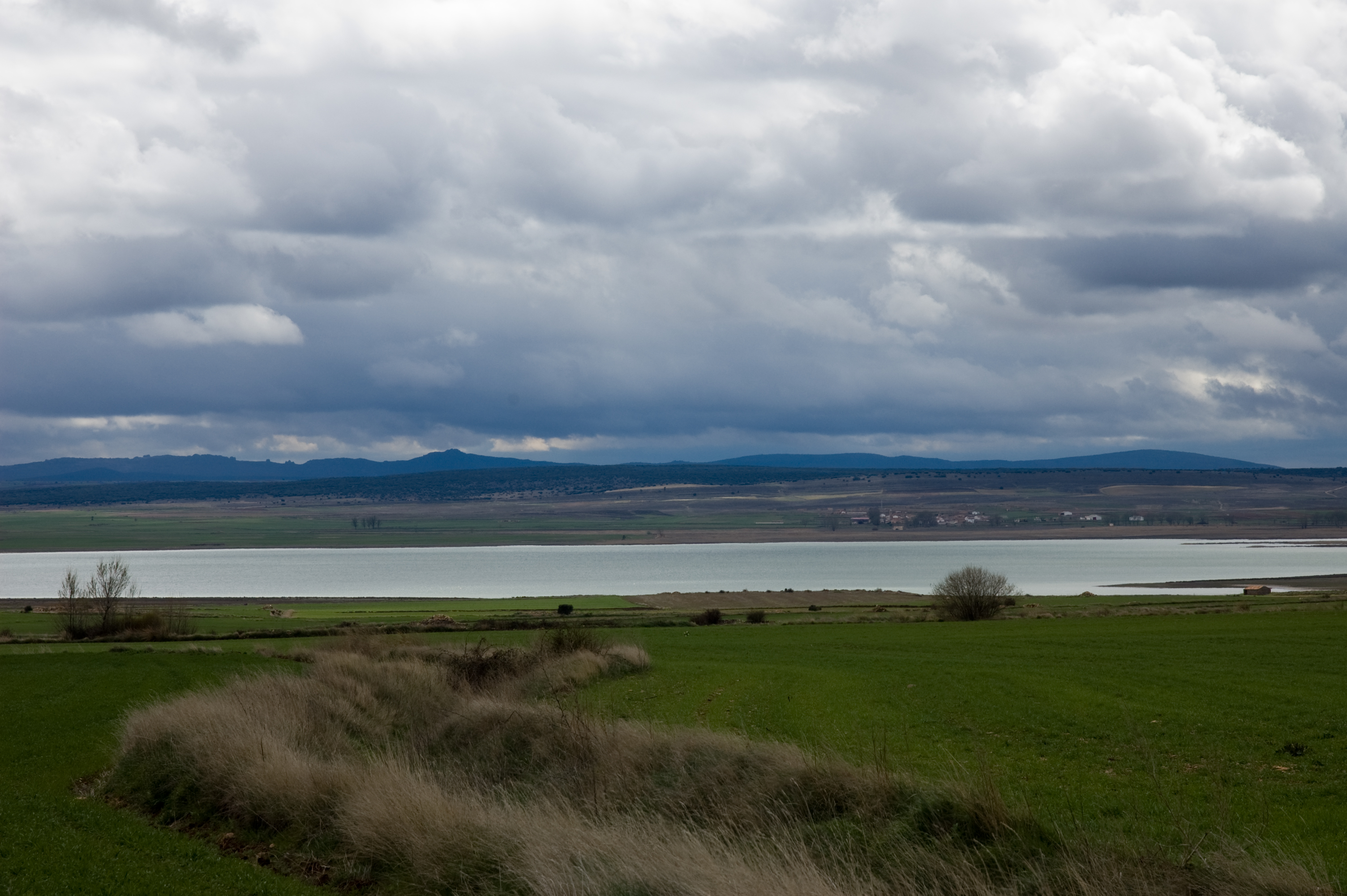 Fotografia de un día nublado de paseo por los alrededores de la Laguna de Gallocanta (Zaragoza/Teruel).